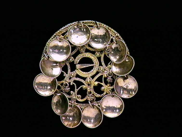 Støpt rosesølje i forgylt sølv med hengende løv. Diameter 6,5 cm. Foto Anne-Lise Reinsfelt / Norsk Folkemuseum, NF.1915-0352.